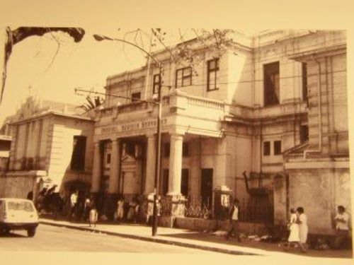 Antiguo hospital Enrique Deformes, en el barrio El Almendral, Valparaíso. El Hospital estuvo ubicado en la avenida Argentina con Pedro Montt. Fue maternidad y hospital de niños.